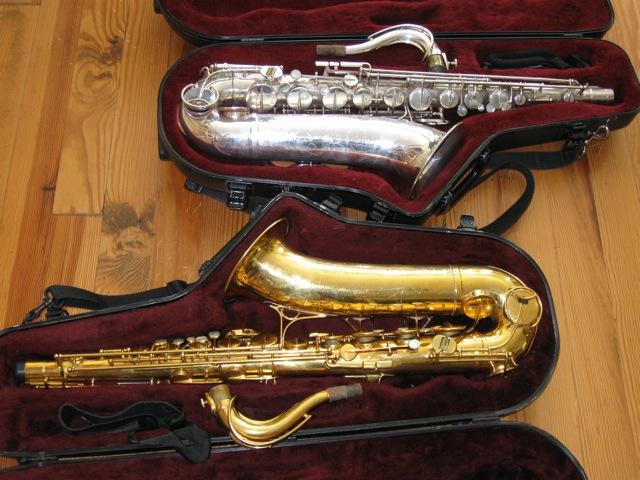 "The Martin Tenor" saxophones of Don Wise